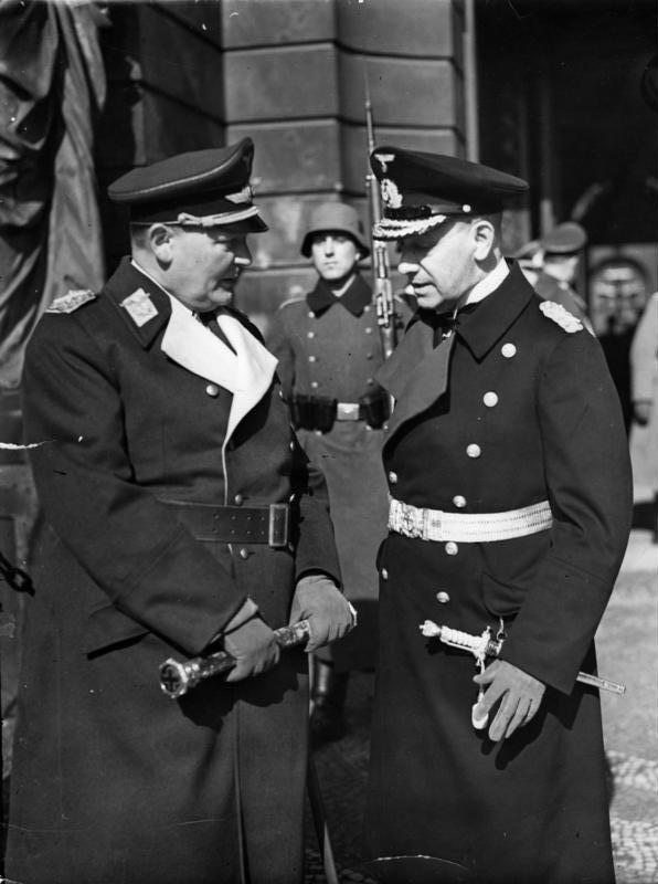 Berlin, Heldengedenktag, Göring und Raeder Heldengedenktag 1940 in Berlin Generalfeldmarschall Göring und Grossadmiral Raeder vor dem Zeughaus im Gespräch, die Ankunft des Führers erwartend. Fot. Eis. 10.3.40. [Herausgabedatum] Abgebildete Personen: Göring, Hermann: Reichsmarschall, Oberbefehlshaber der Luftwaffe, Ministerpräsident von Preußen, Deutschland Raeder, Erich: Großadmiral, Oberbefehlshaber der Kriegsmarine, Deutschland (GND 118743511)